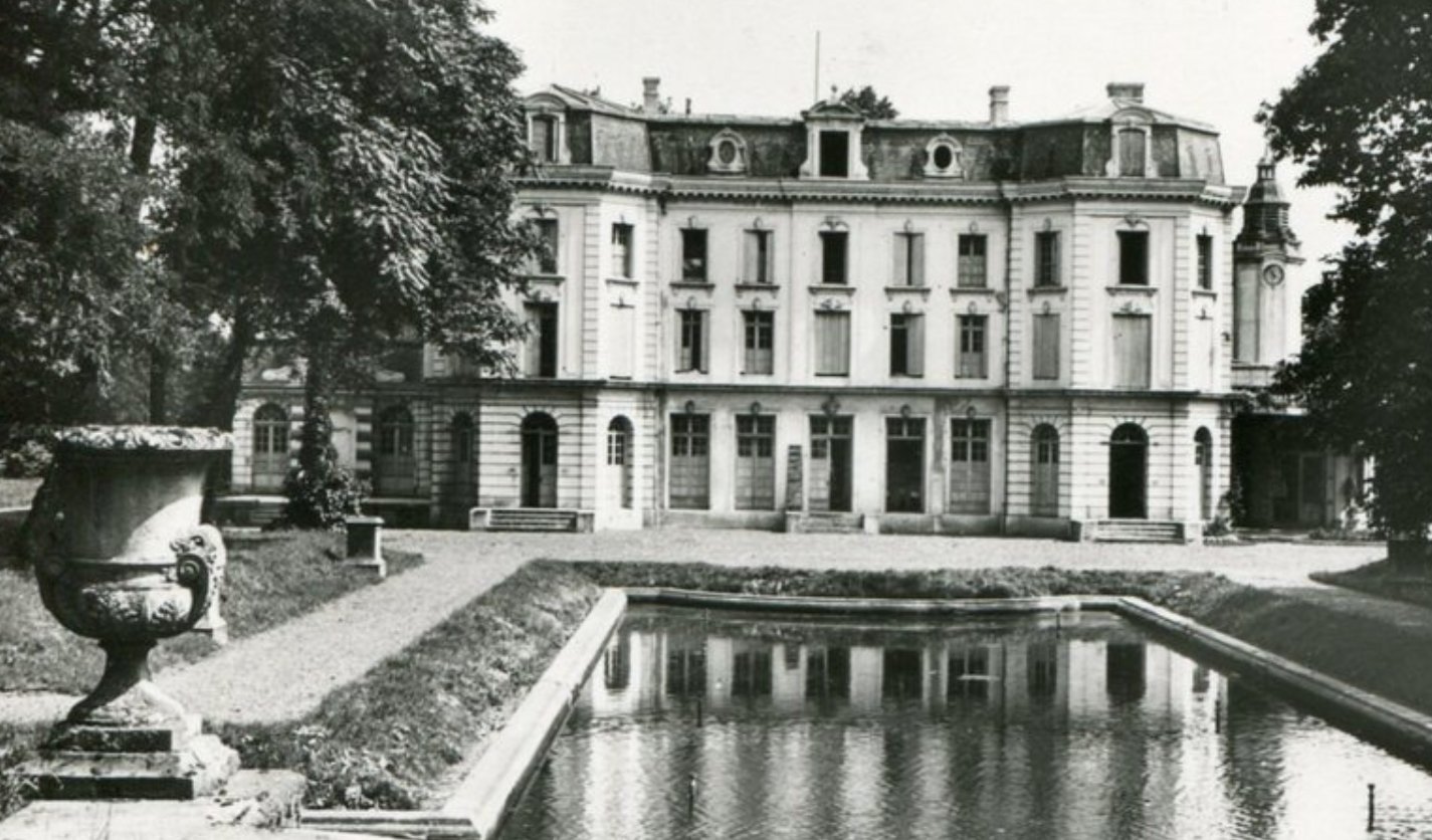 Le château Mercier était la résidence de l'ingénieur-directeur de la Compagnie des mines de Béthune dans le bassin minier du Nord-Pas-de-Calais, à Mazingarbe, Pas-de-Calais, Nord-Pas-de-Calais, France. Il est inscrit aux monuments historiques le 9 octobre 2009 et inscrit sur la liste du patrimoine mondial par l'Unesco le 30 juin 2012 et y constitue en partie le site no 81.